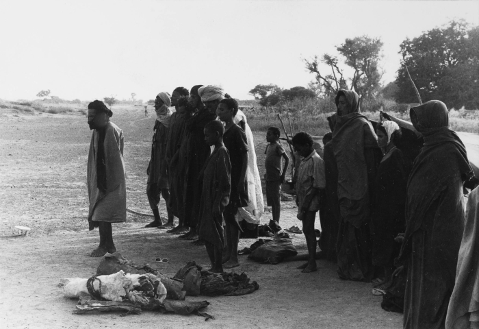 Het rituele gebed binnen de Islam wordt salat genoemd. Het zonsondergang of avondgebed, de maghrib, is het vierde gebed van de dag. In totaal zijn Moslims verplicht vijf dagelijkse gebeden te verrichten. De heer Broekhuijse heeft het gehele gebed op foto vastgelegd, de juiste volgorde waarop de foto's bezien moeten worden is: 20010324, 20010323, 20010321, 20010320 en 20010322.